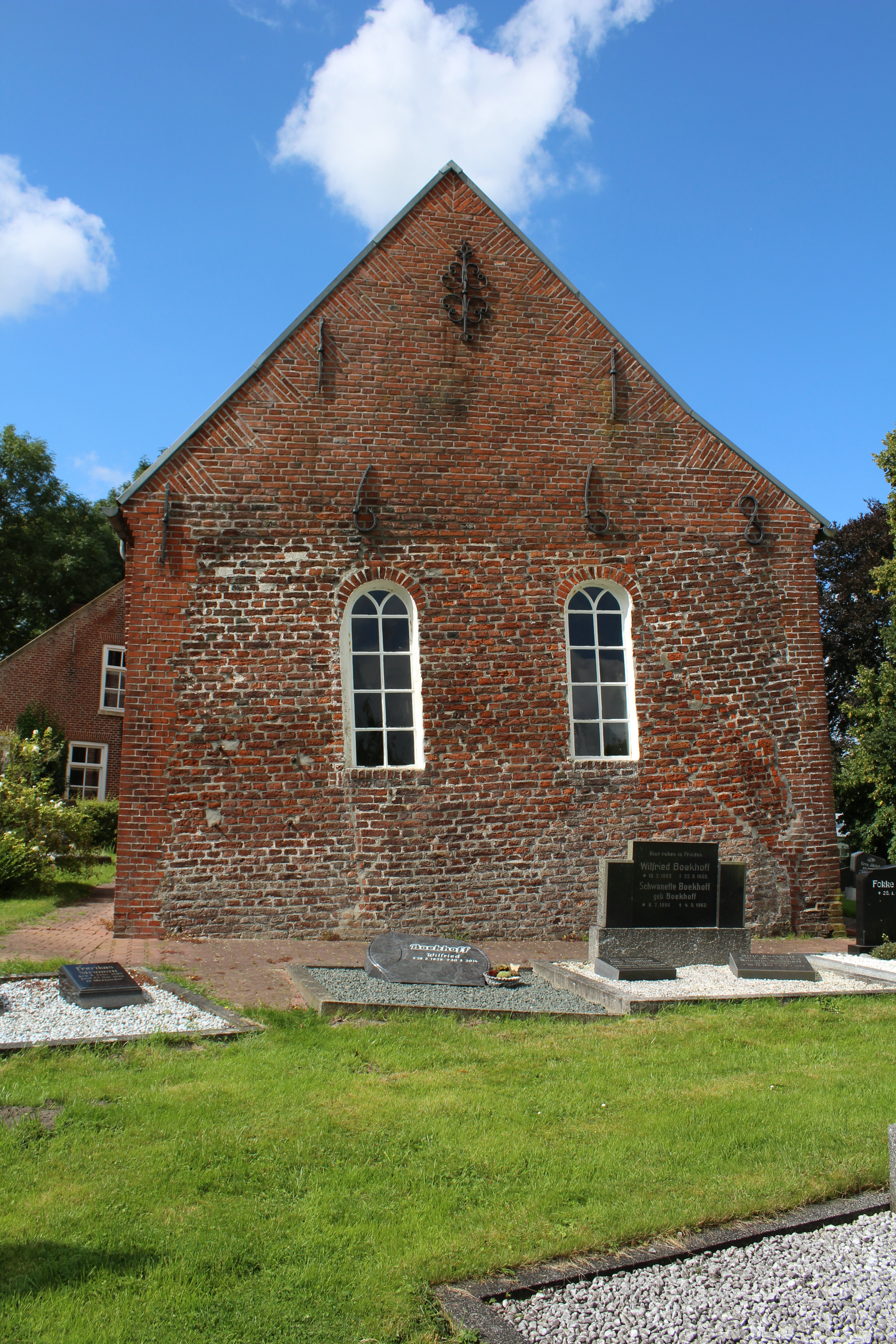 Ev.-reformierte Kirche St. Maria in Marienchor, Gemeinde Jemgum, Landkreis Leer, Ostfriesland, Deutschland